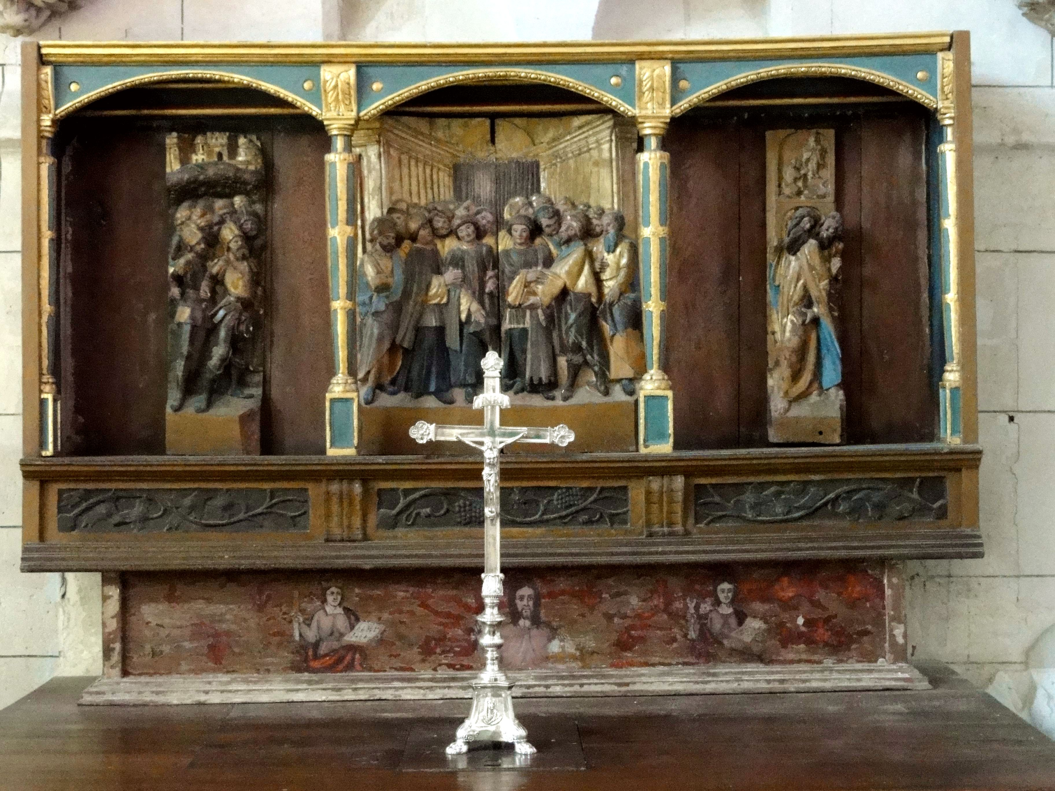 Retable XVe s, en partie volé en 1964.